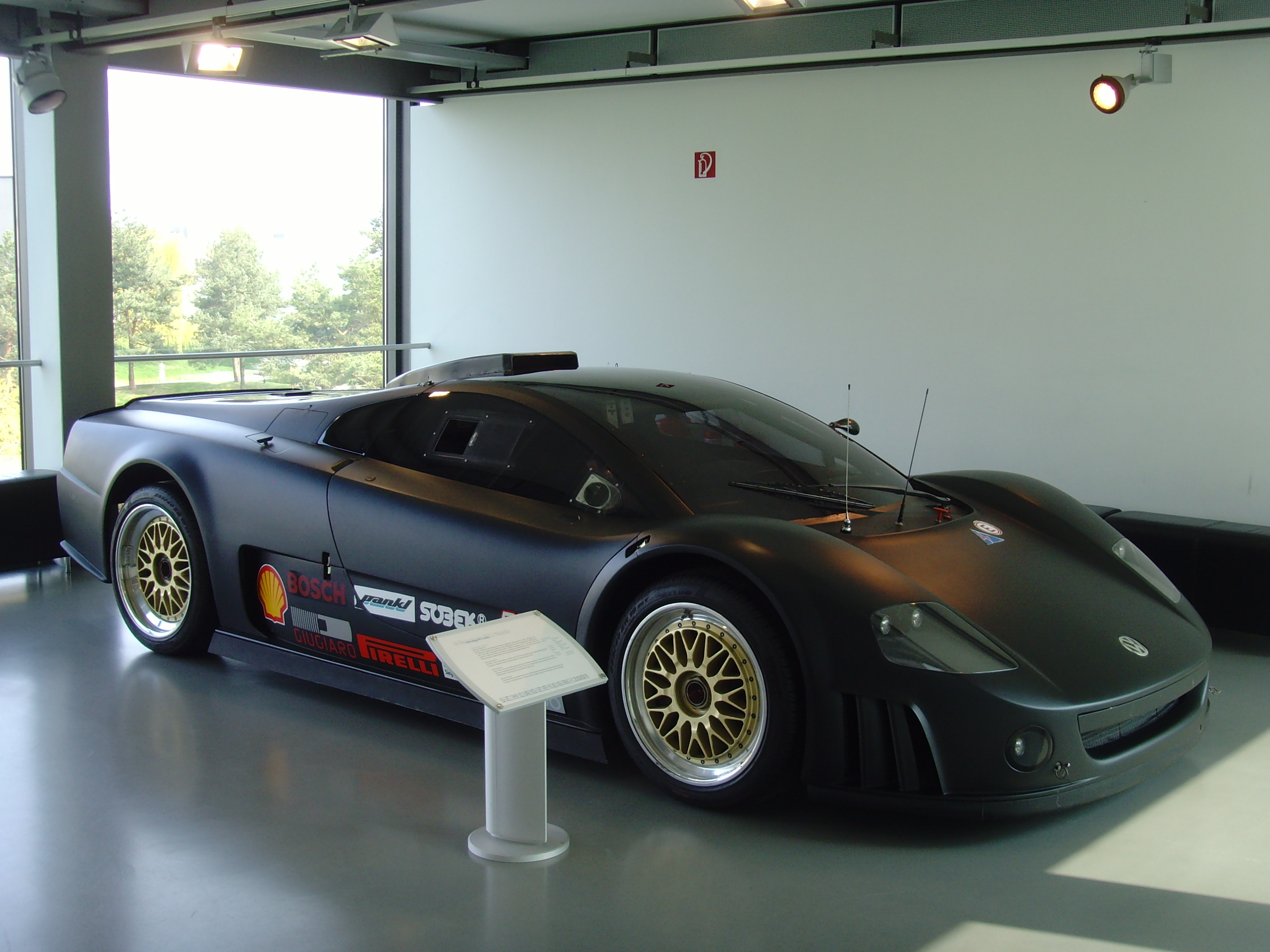 Autostadt Wolfsburg - ZeitHaus - Volkswagen Nardo